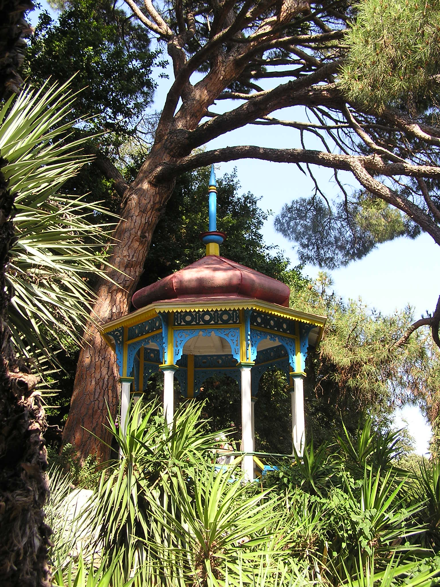 Никитский ботанический сад